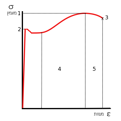 דיאגרמת מאמץ - מעוות של פלדה רכה